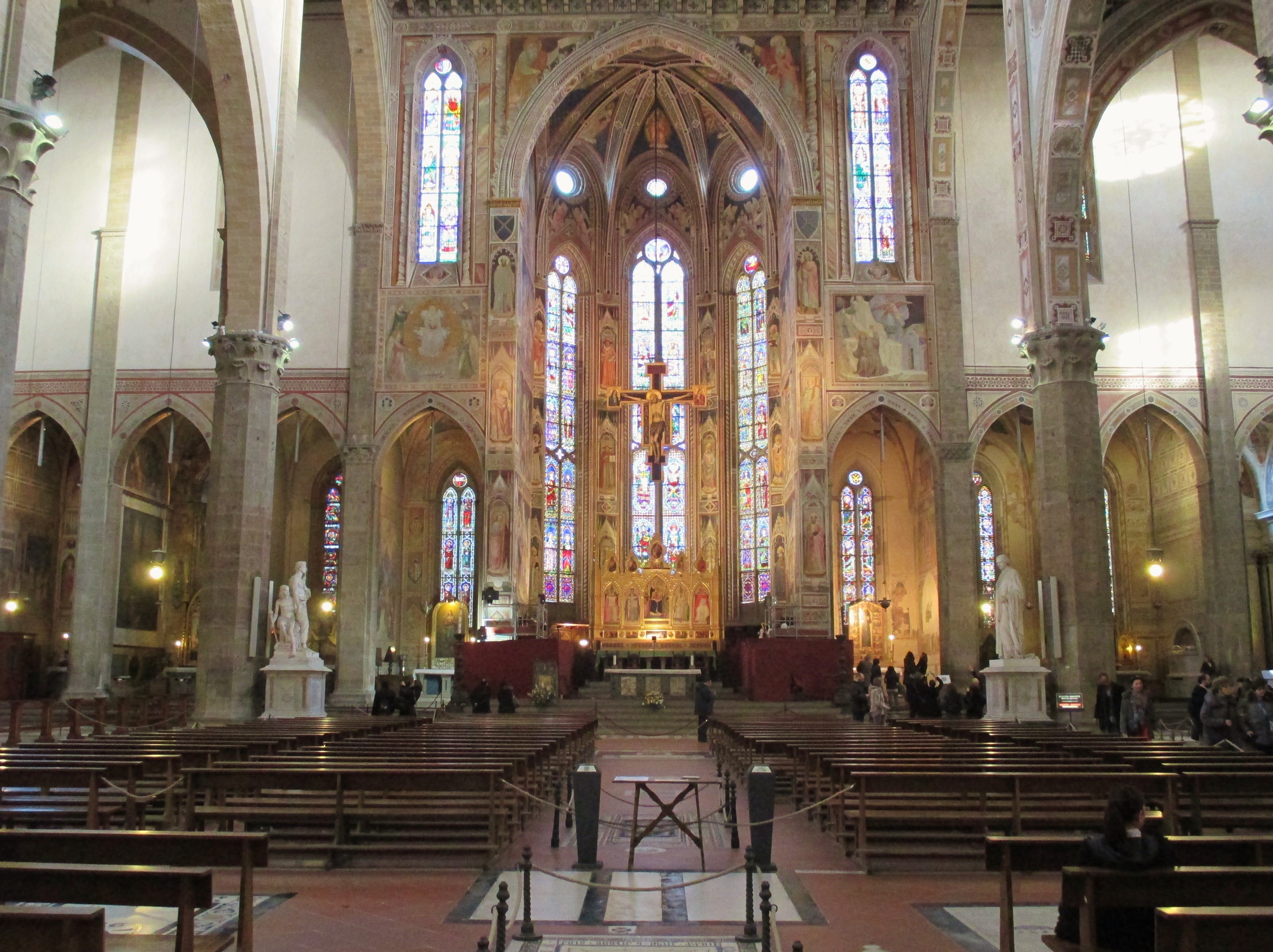 Firenze, veduta verso l'abside di Santa Croce.